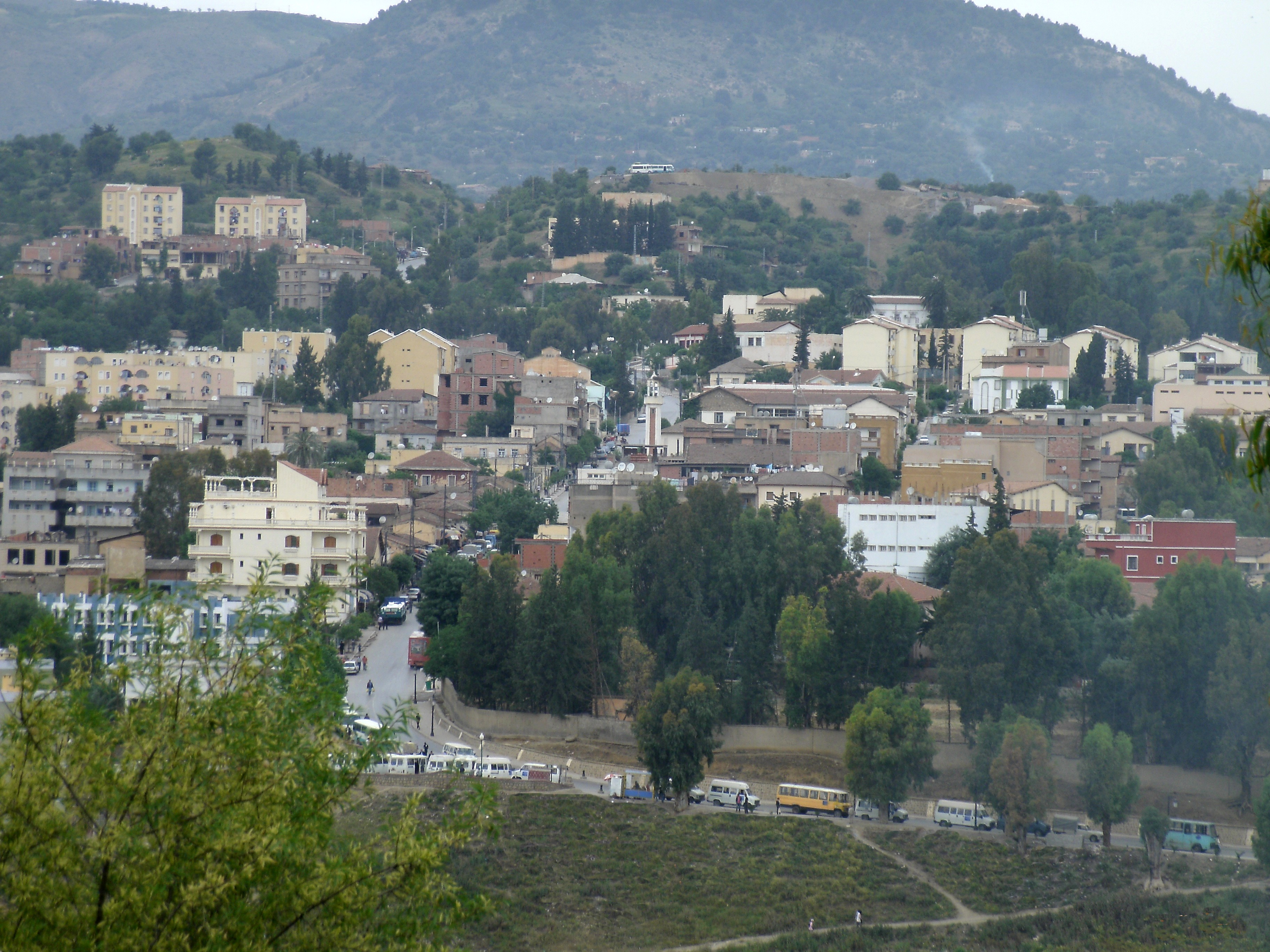 Zoom sur la rue principale de Tablat, commune de la wilaya de Médéa en Algérie.